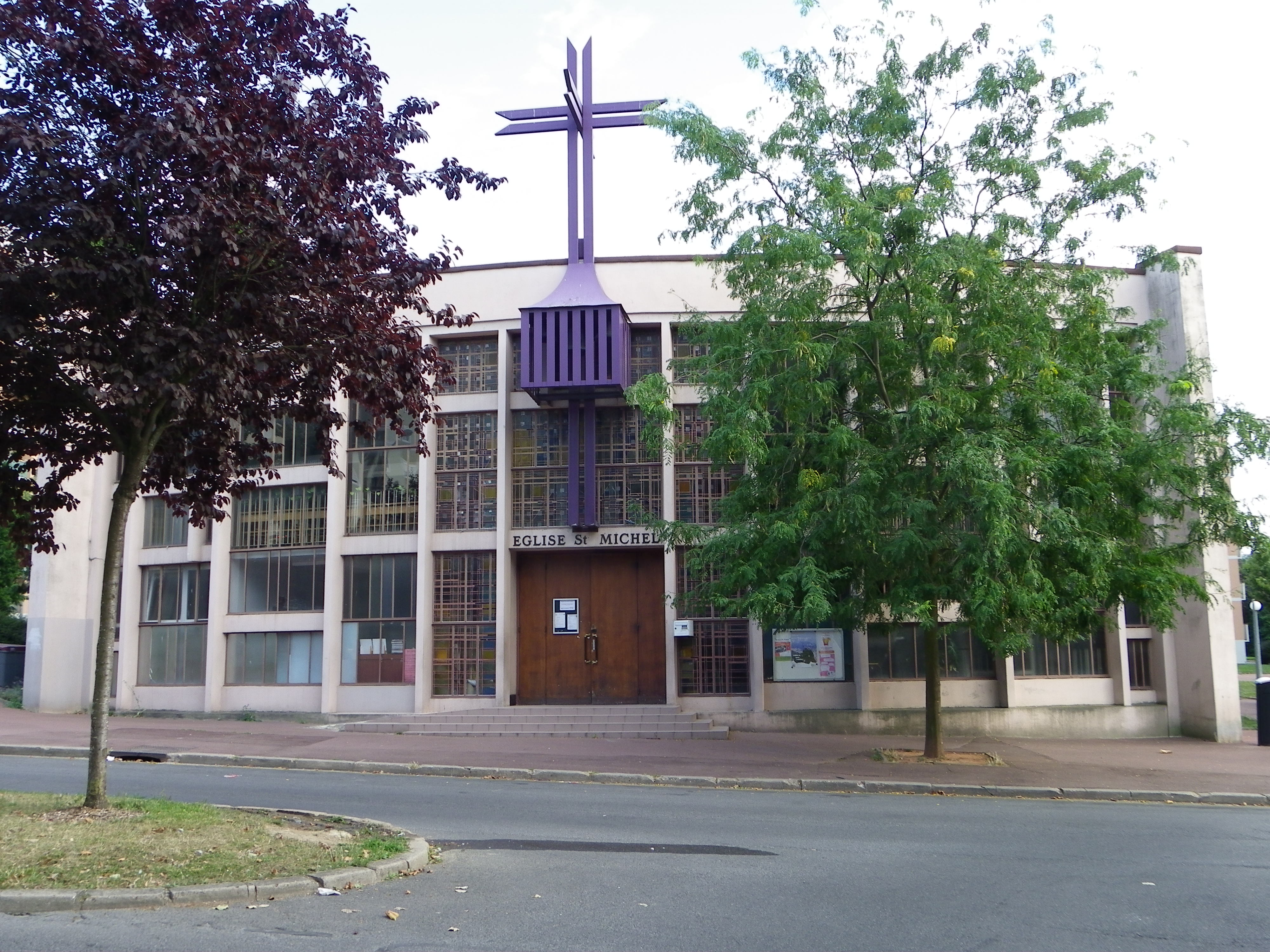 Eglise Saint-Michel à Créteil